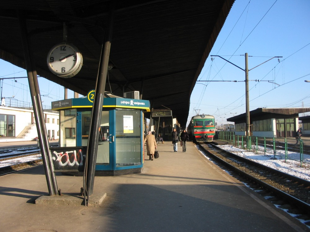 Centrālā dzelzceļa stacija